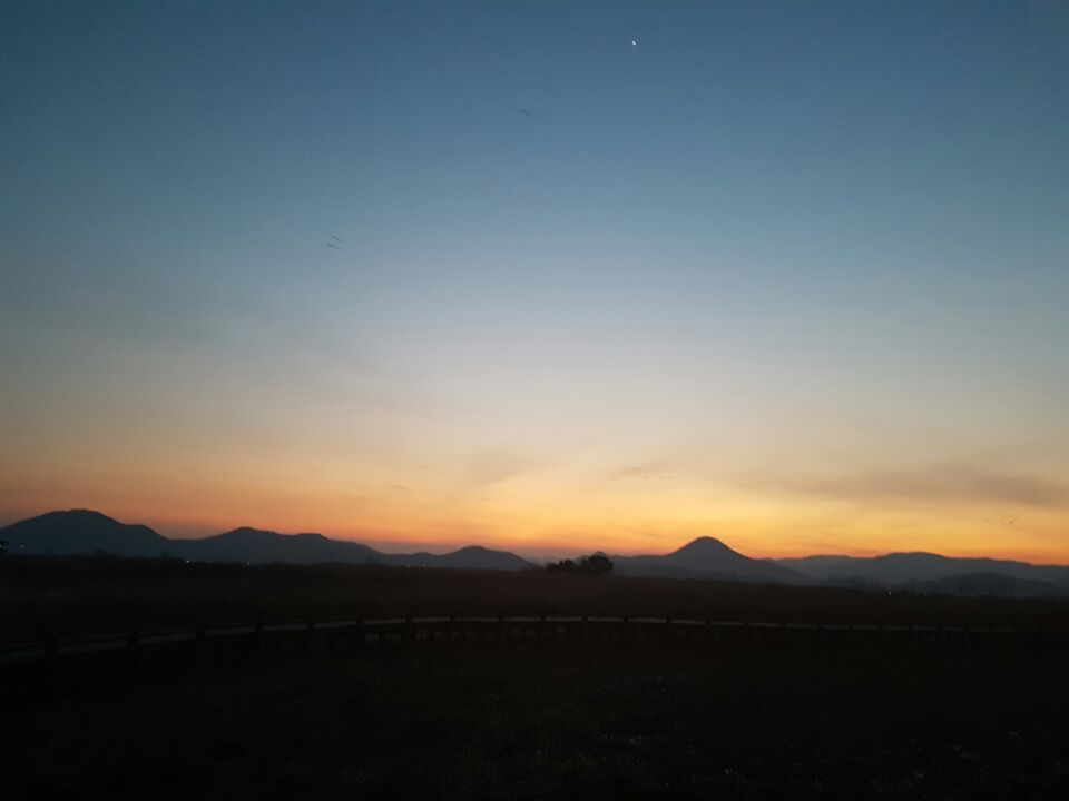 순천만 용산전망대가는 길에 갈대밭 노을